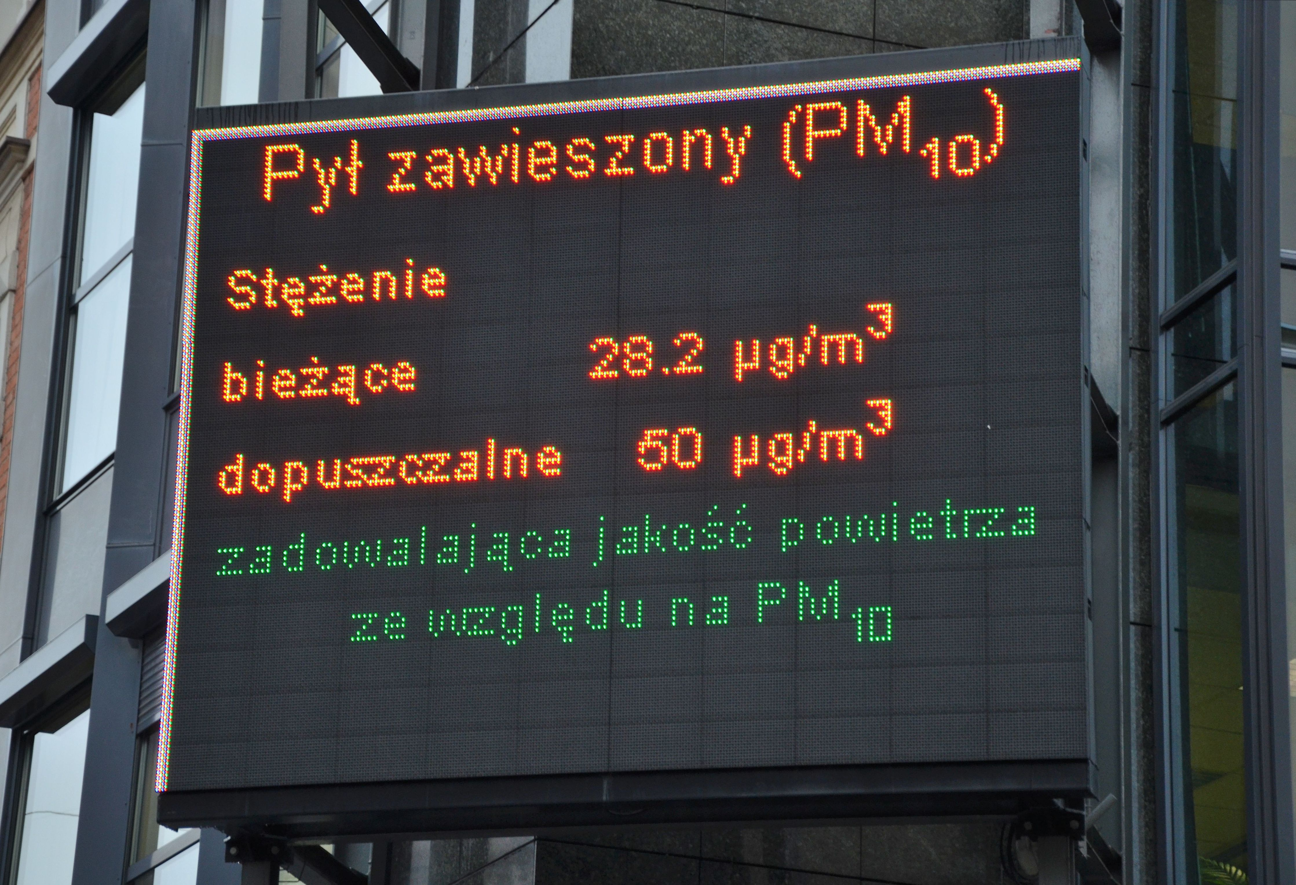 Komunikat o jakości powietrza w Katowicach 7.10.2011 godz. 9.10